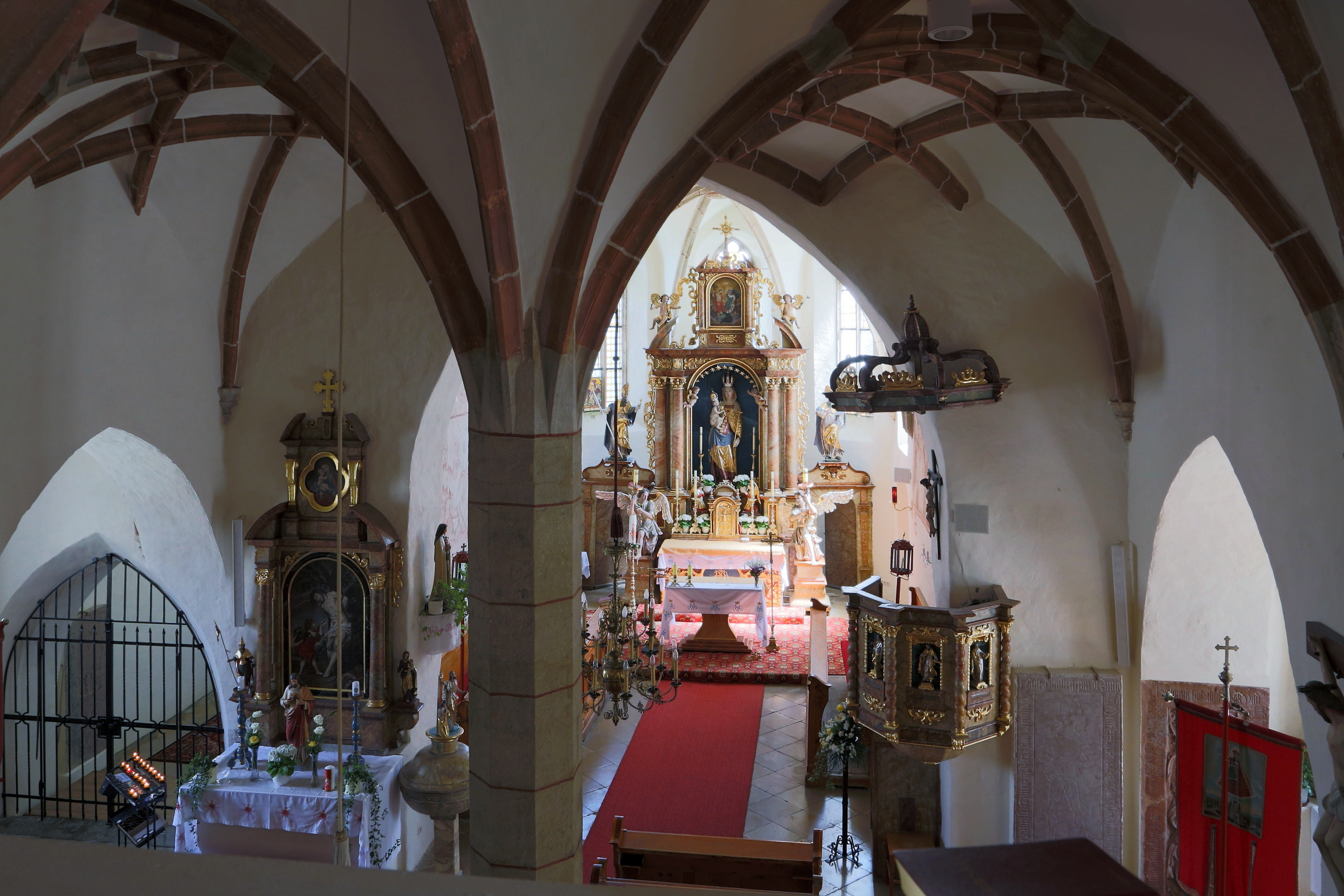 Blick vom Orgelempore Richtung Chorraum in der katholischen Pfarrkirche Mariae Himmelfahrt in Neukirchen am Ostrong, ein Ortsteil der niederösterreichischen Marktgemeinde Pöggstall.